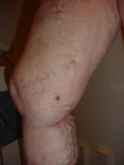 Récidive post-stipping